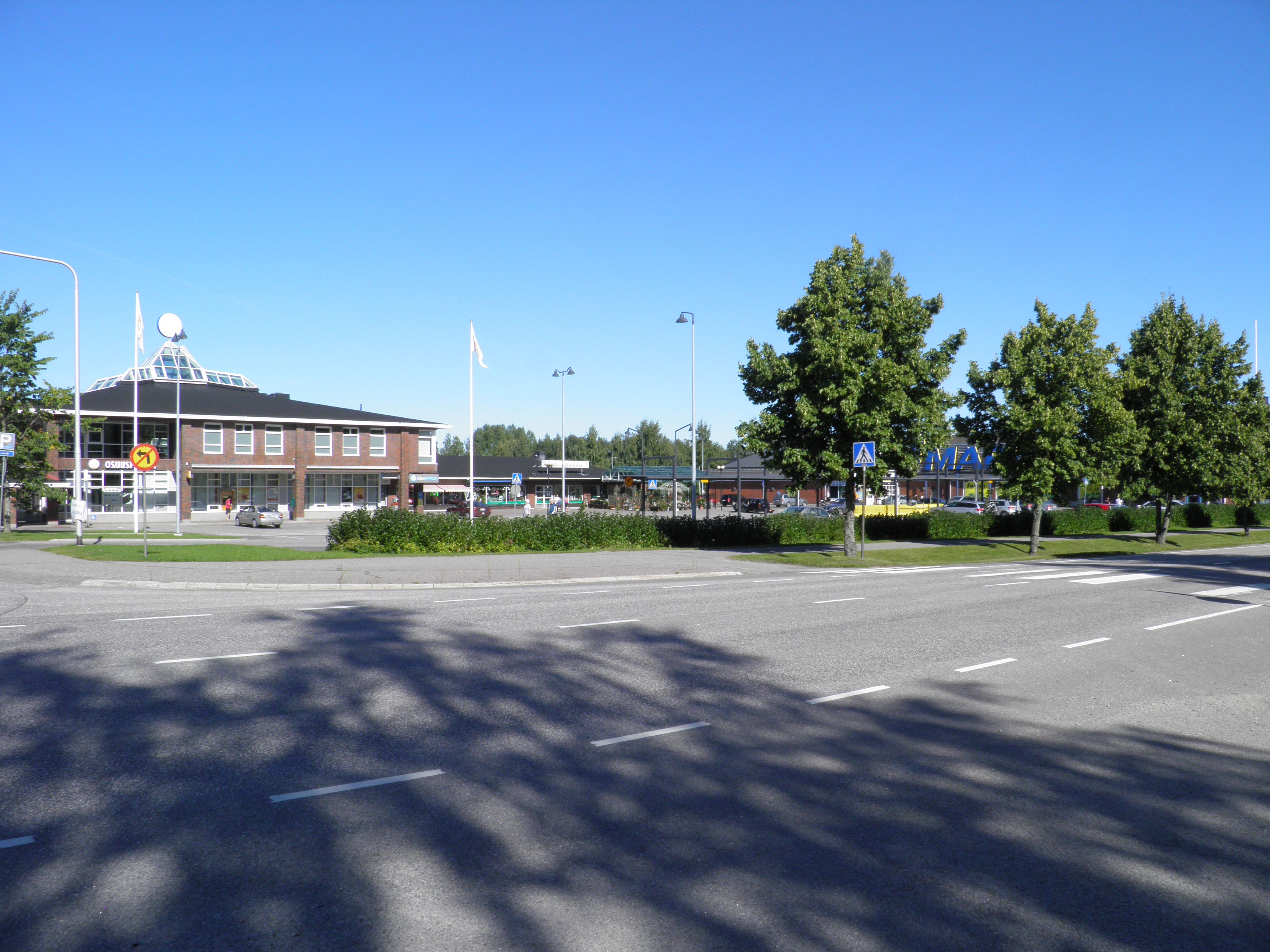 Asikkalan Vääksyn liikekeskustaa Anianpellossa.